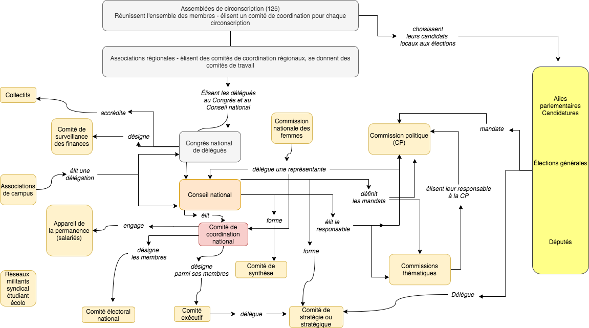 Ce diagramme sur le fonctionnement interne de Québec Solidaire est une adaptation de celui présenté à la page 16 du document « Présentation de QUÉBEC SOLIDAIRE, Édition 2017 ». Disponible à